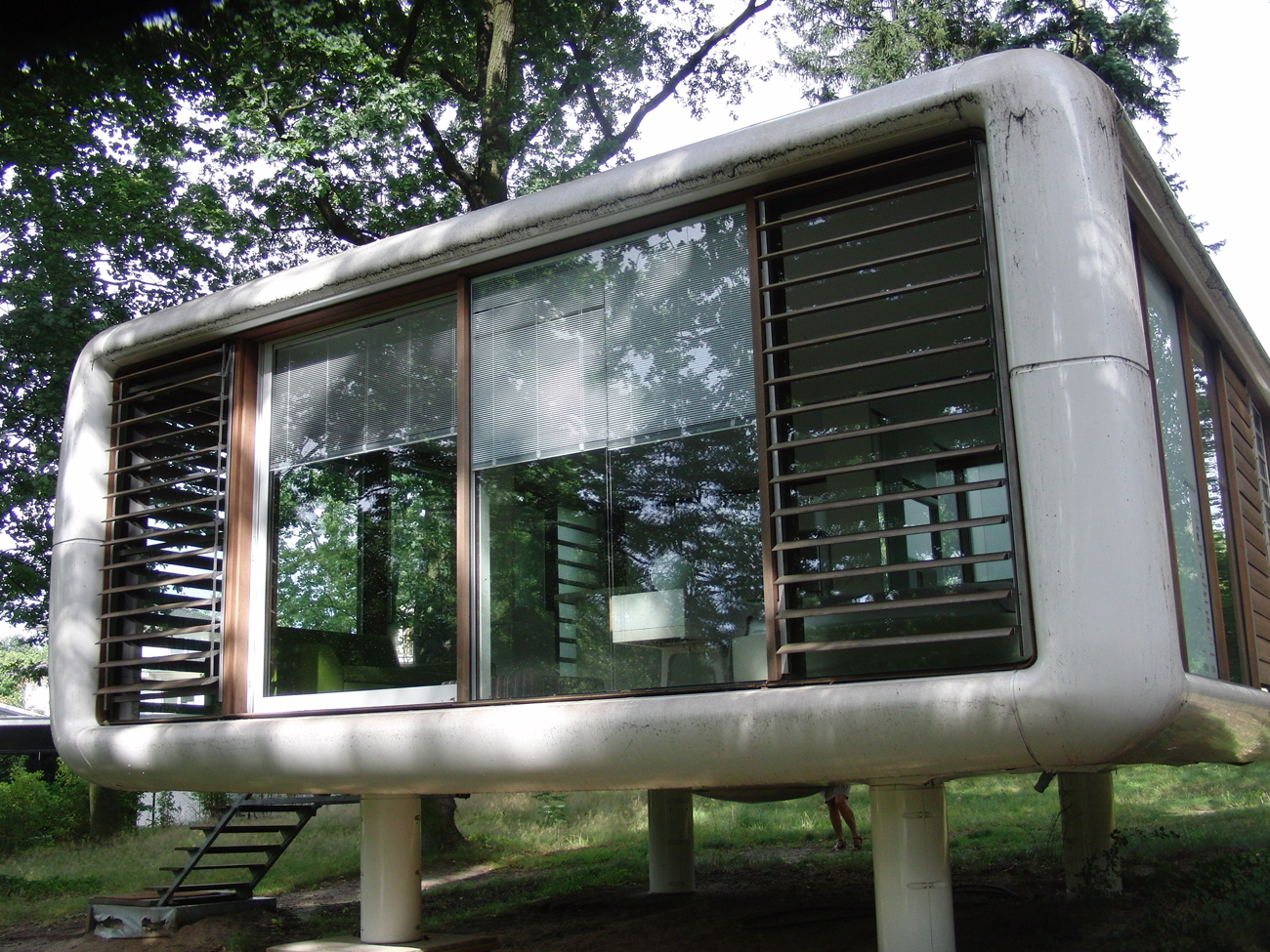 Nahaufnahme des "Loftcube" von Werner Aisslinger im 'Haus am Waldsee', Berlin-Zehlendorf